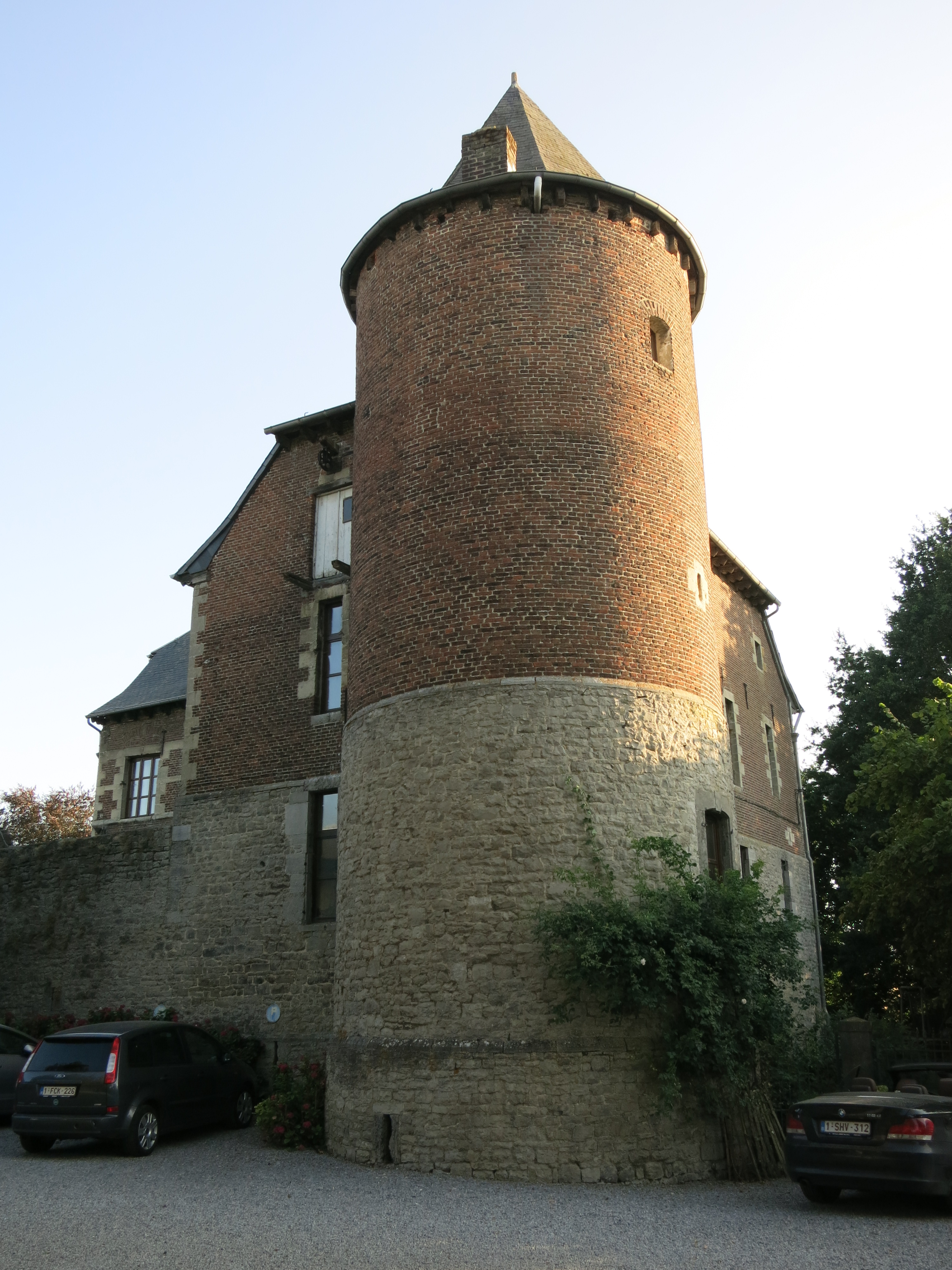 Château de Marsinne Rue Médaille 17, HERON (Couthuin) Hameau : Marsinne